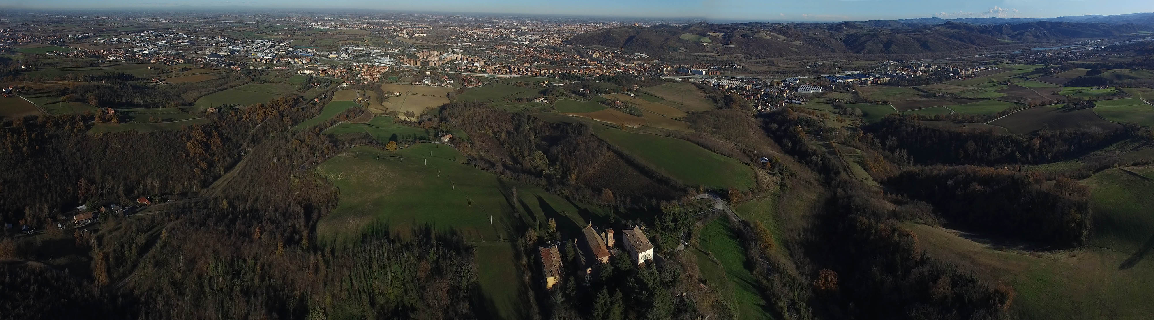 Visione aerea dell'eremo con sullo sfondo la valle del Reno, San Luca, Casalecchio, Bologna.....